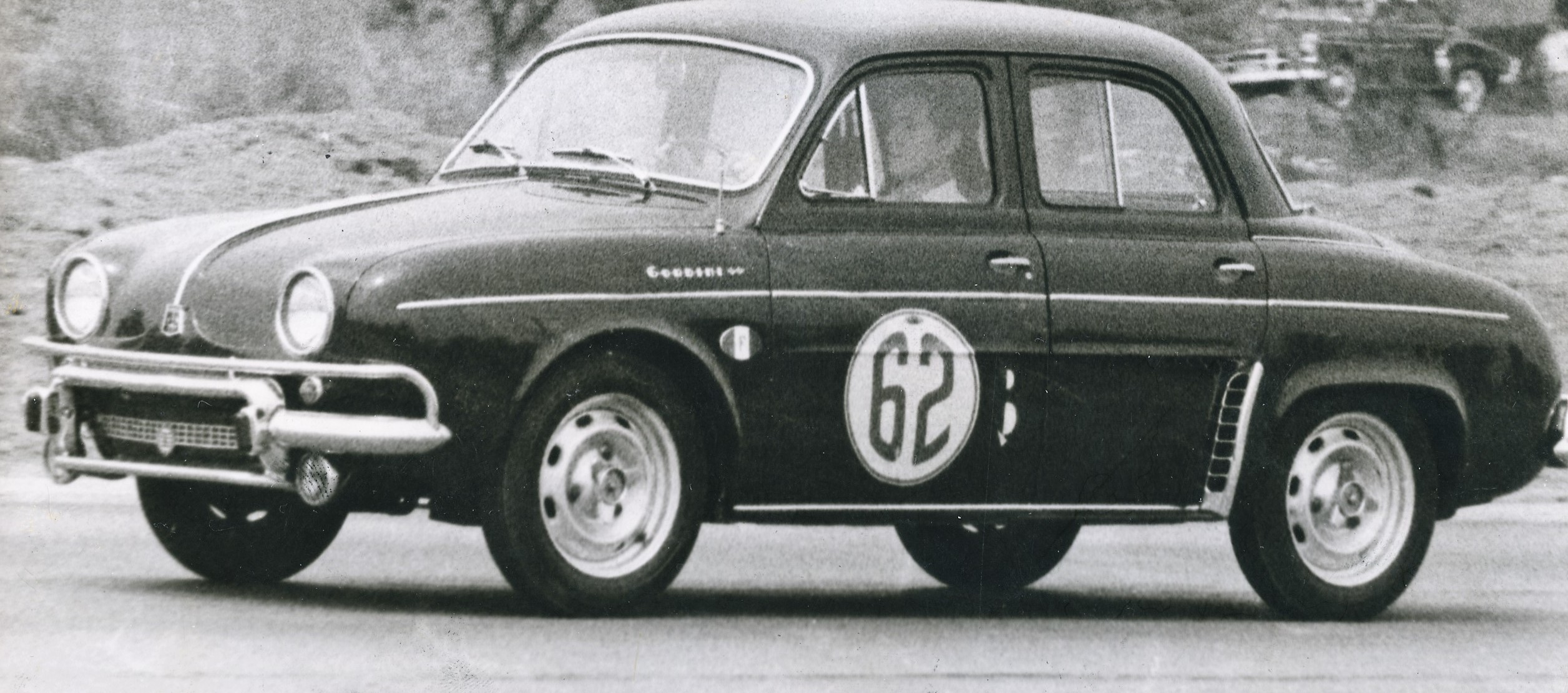 Fotografia do Fundo Correio da Manhã, sob a guarda do Arquivo Nacional.